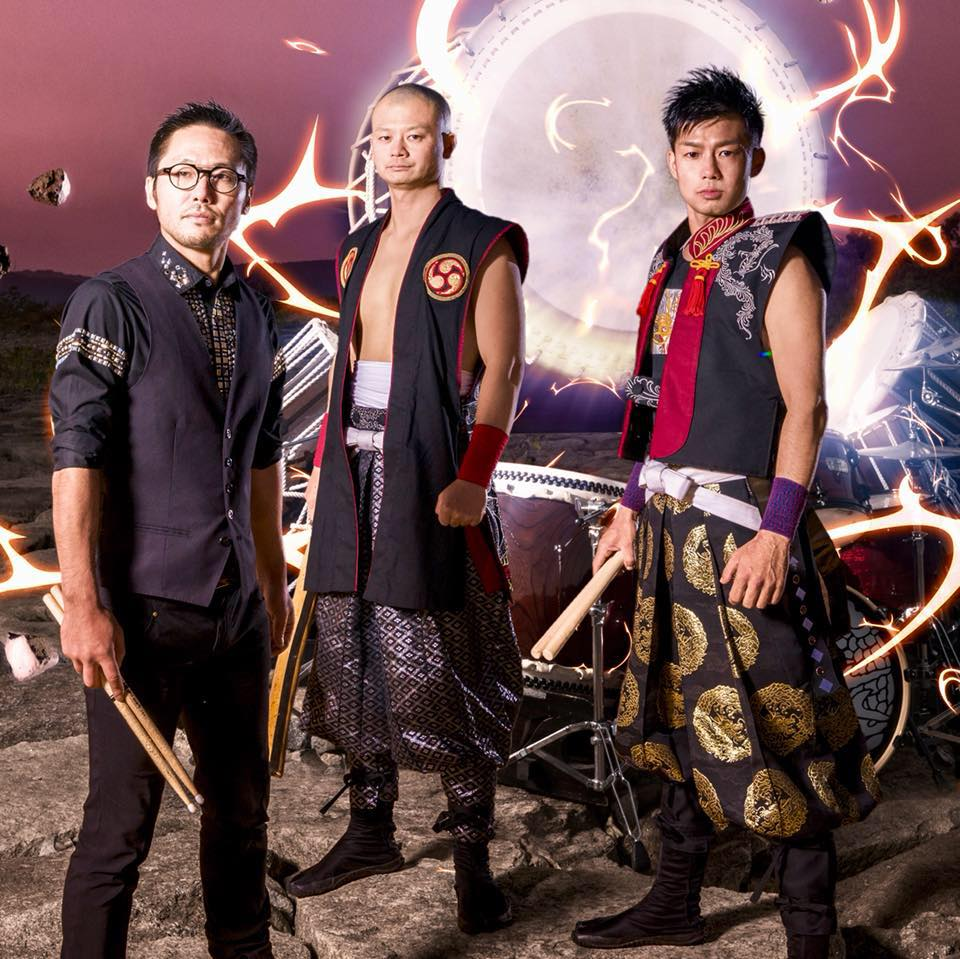 太鼓ユニット我龍-garyu- のプロフィール写真